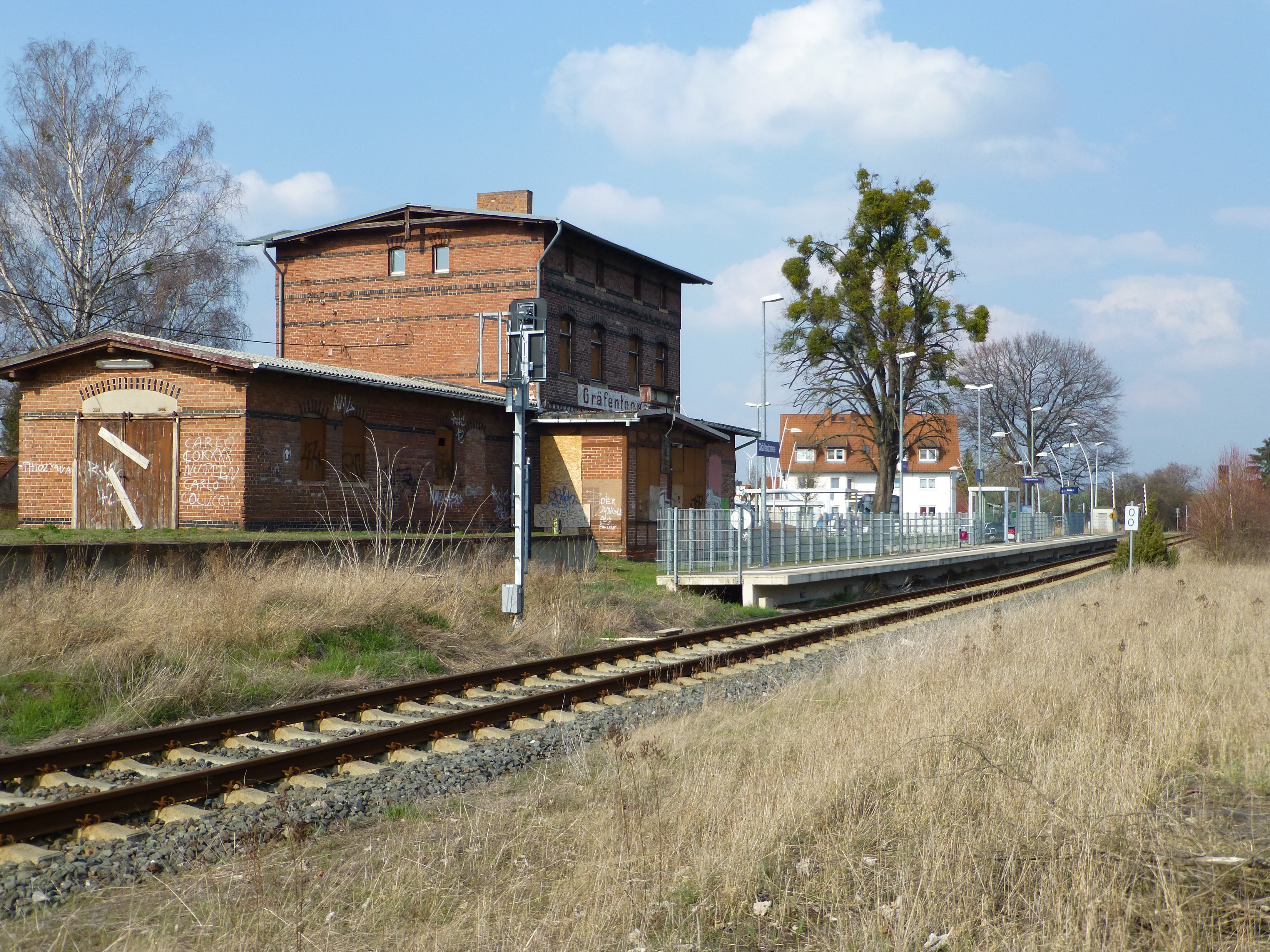 Der Bahnhof in Gräfentonna von der Gleisseite